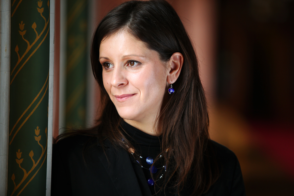 Szél Bernadett magyar közgazdász, politikus, országgyűlési képviselő